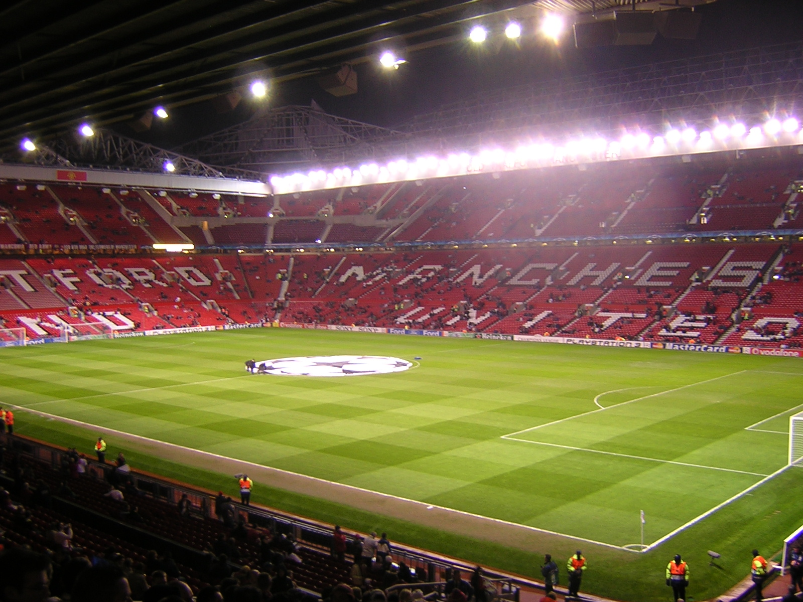 Old Trafford